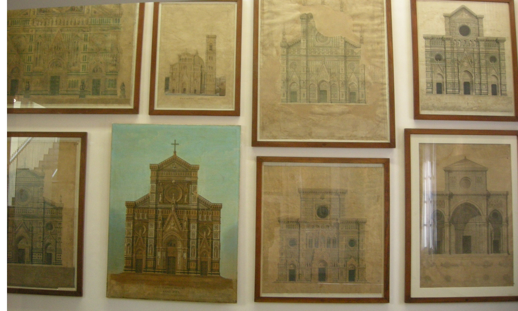 Progetti di facciata dopo il concorso (XIX sec)